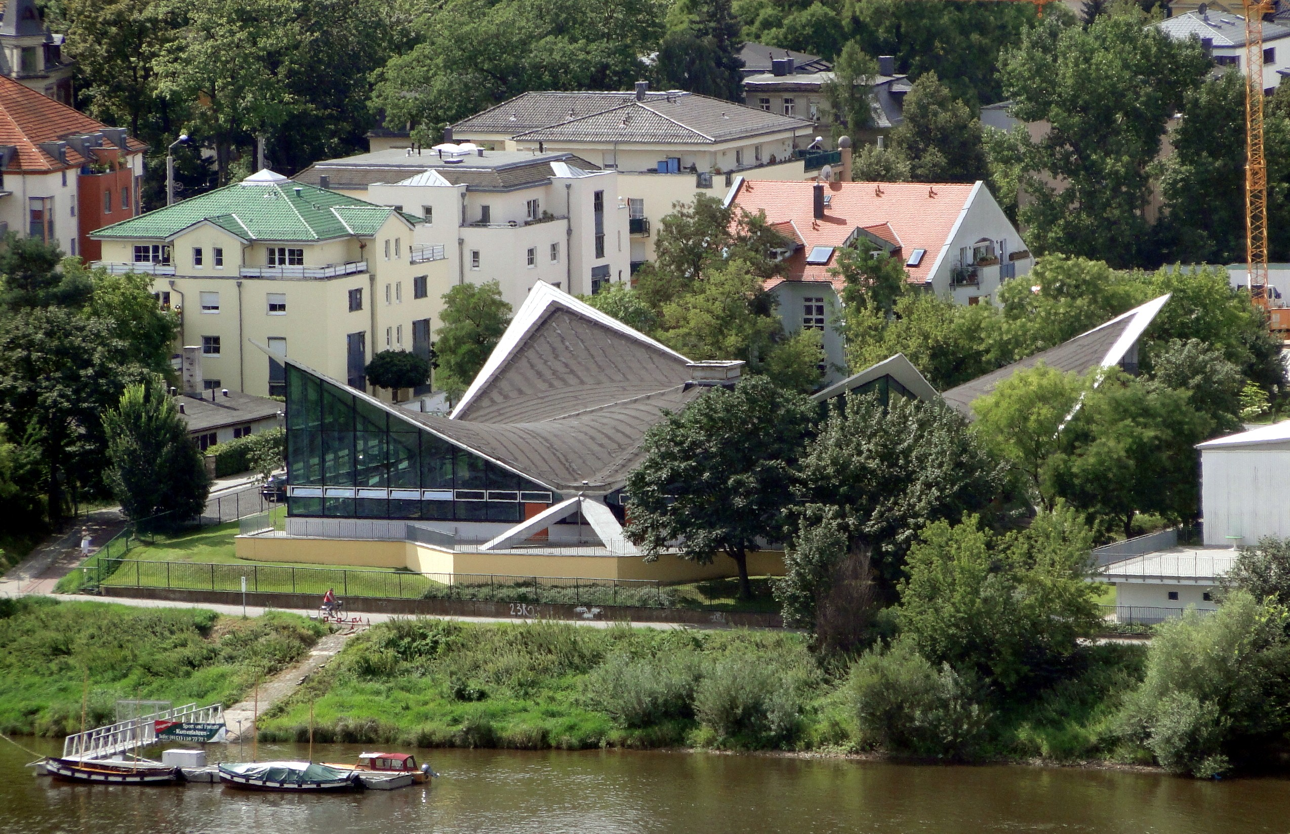 Ruderzentrum Blasewitz.This is a photograph of an architectural monument.It is on the list of cultural monuments of Dresden